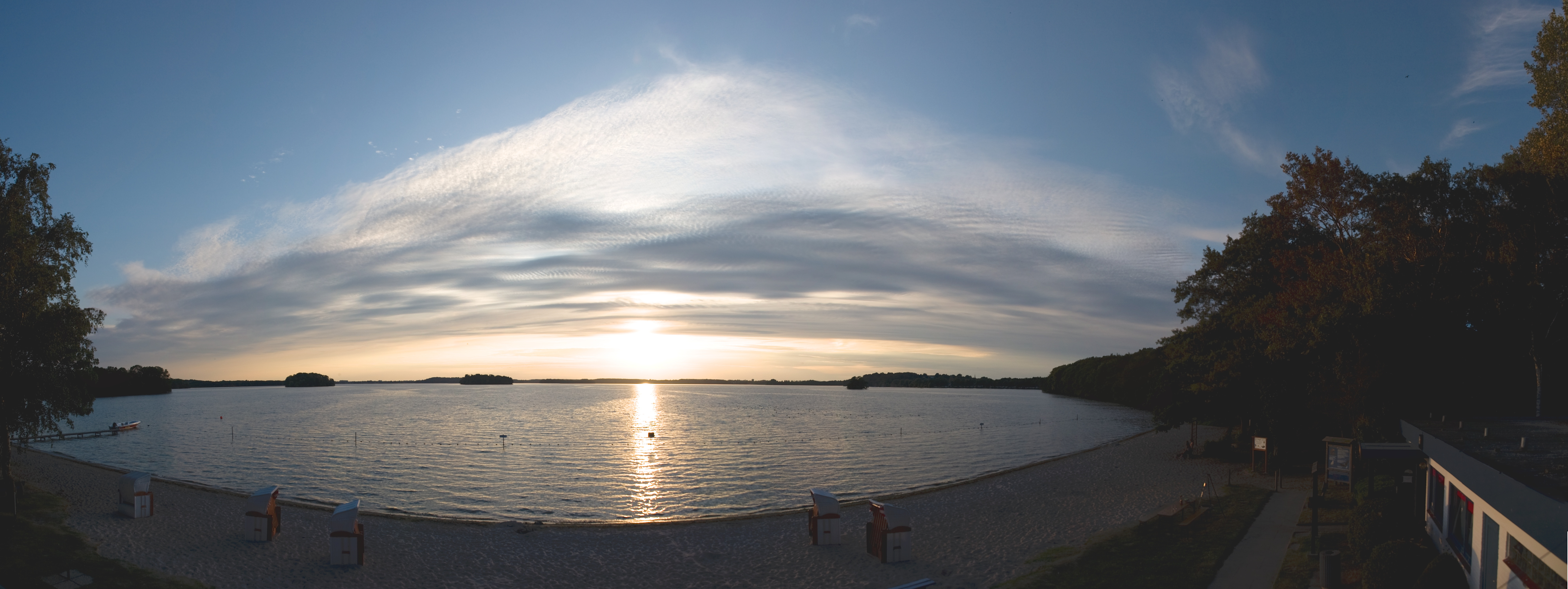 Strand der Prinzeninsel mit Blick auf den Großen Plöner See in Richtung Ascheberg